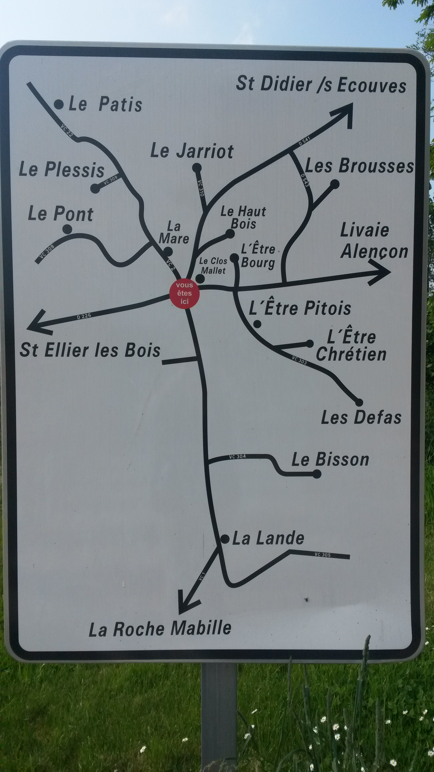 Disposition géographique des lieux dits de Longuenoë.